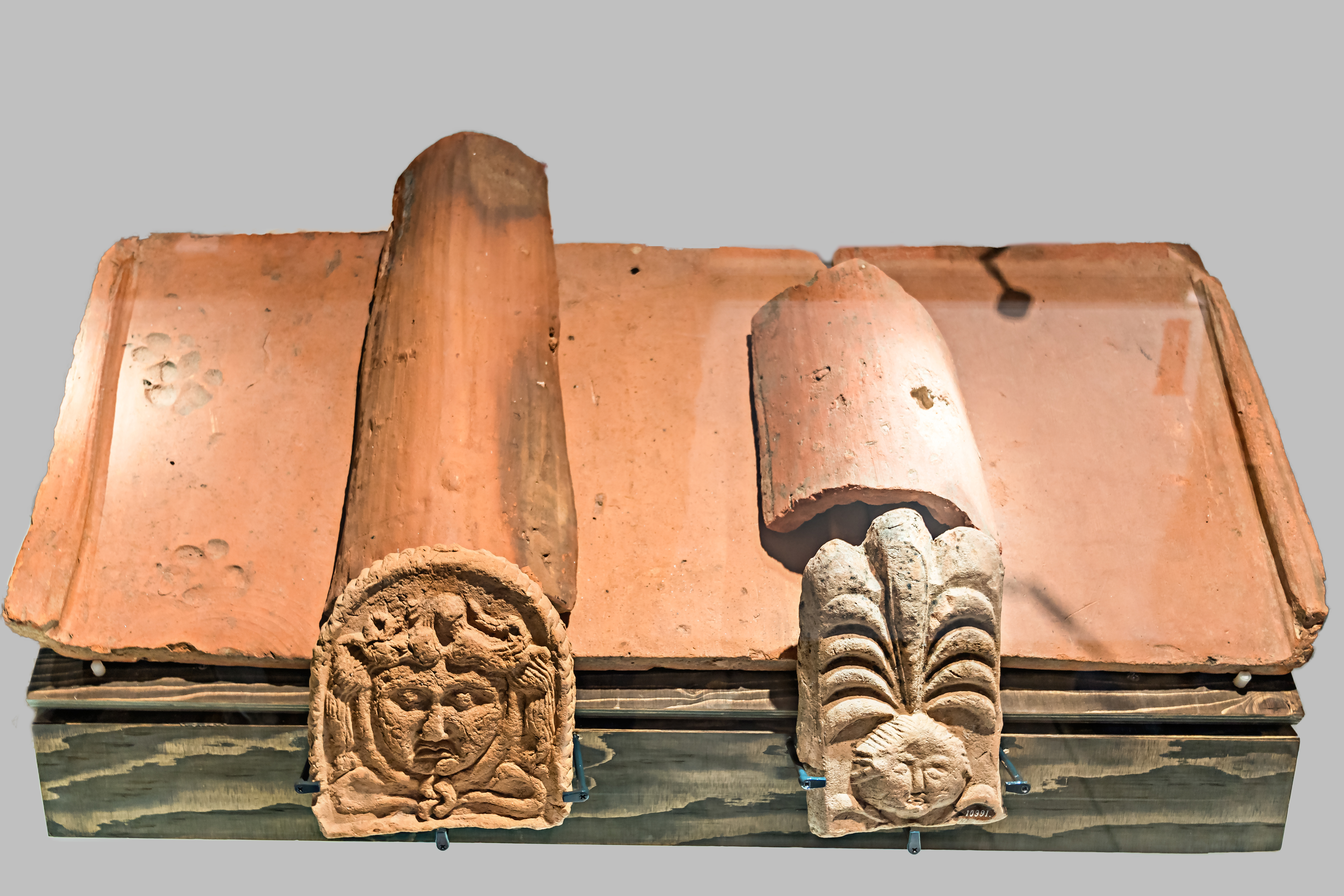 Römische Stirnziegel (antefixes) mit Medusenköpfen als Verzierung und Unheilsabwender, die vor die gewölbten Ziegel (imbrices) angebracht wurden. Ausgestellt in der Festung Ehrenbreitstein (Koblenz). Eine Leihgabe des Landesmuseum Bonn.